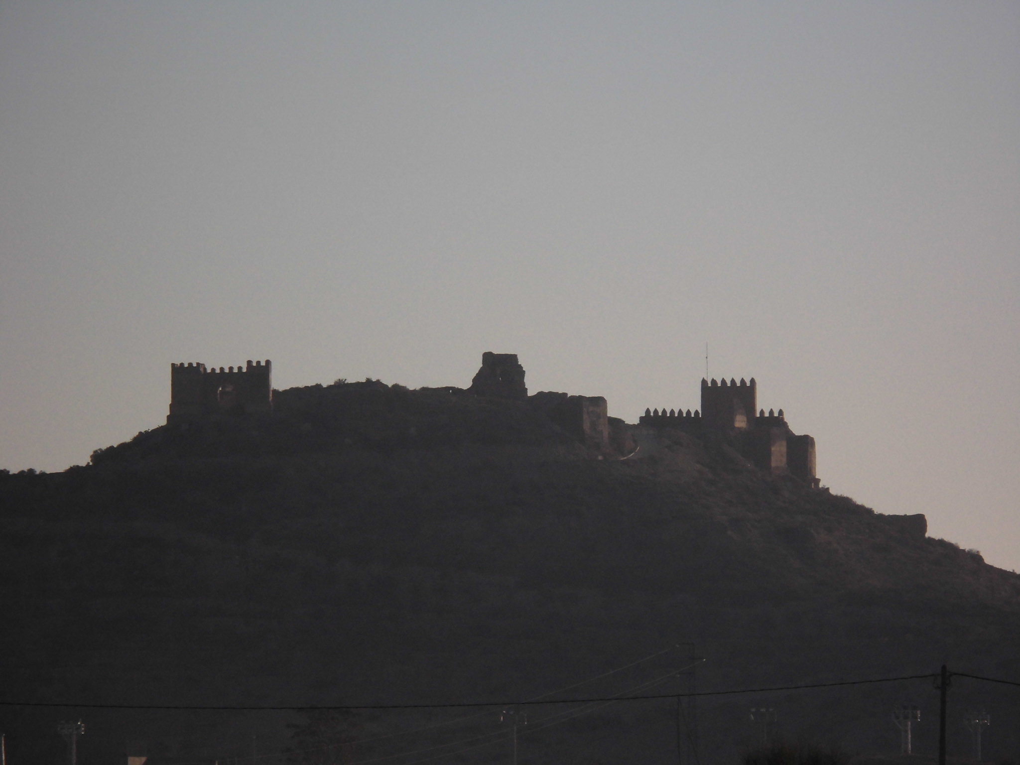 Fotografía del castillo de Tabernas, municipio de Tabernas, provincia de Almería, Andalucía, España. Tomada desde la carretera a Macael.